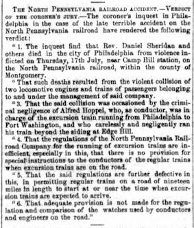 Verdict du jury d'accusation publié dans le New York daily tribune